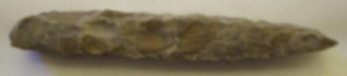 Fyrsidig mellanneolitisk mejsel från Fredriksborgs amt i Danmark, fotograferad den 18 oktober 2005 av Harri Blomberg.